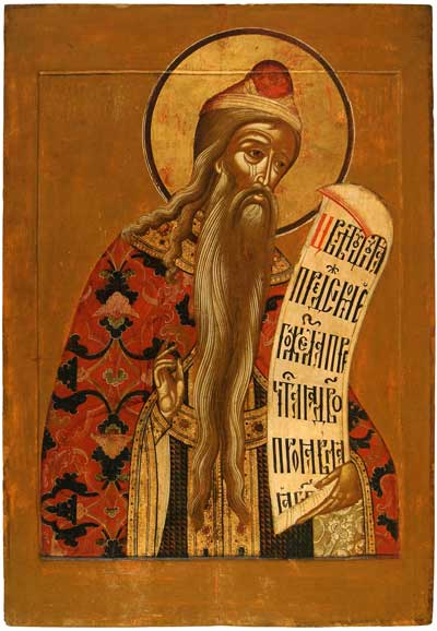 Пророк Аарон. Пророческий чин из главного иконостаса ц. Иоанна Златоуста в Коровниках в Ярославле. Ок. 1654 г. Ярославский историко-архитектурный и художественный музей заповедник, Ярославль, Россия